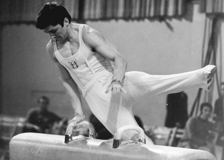 Lutz Mack ADN-ZB Liebers-10.12.72-B-Potsdam: Lutz Mack siegte im Olympischen Zwölfkampf - Einen vierfachen Erfolg für die Turner des SC Chemie Halle gab es am Sonntag in Potsdam bei Turnwettbewerben der Meisterklasse. In Abwesenheit der Nationalmannschafts-Mitglieder siegte Lutz Mack (unser Archivbild) im olympischen Zwölfkampf mit 109,50 Punkten vor Reinhardt Schubert (107,75), Rainer Hanschke (107,60) und Horst Werner (107,20).